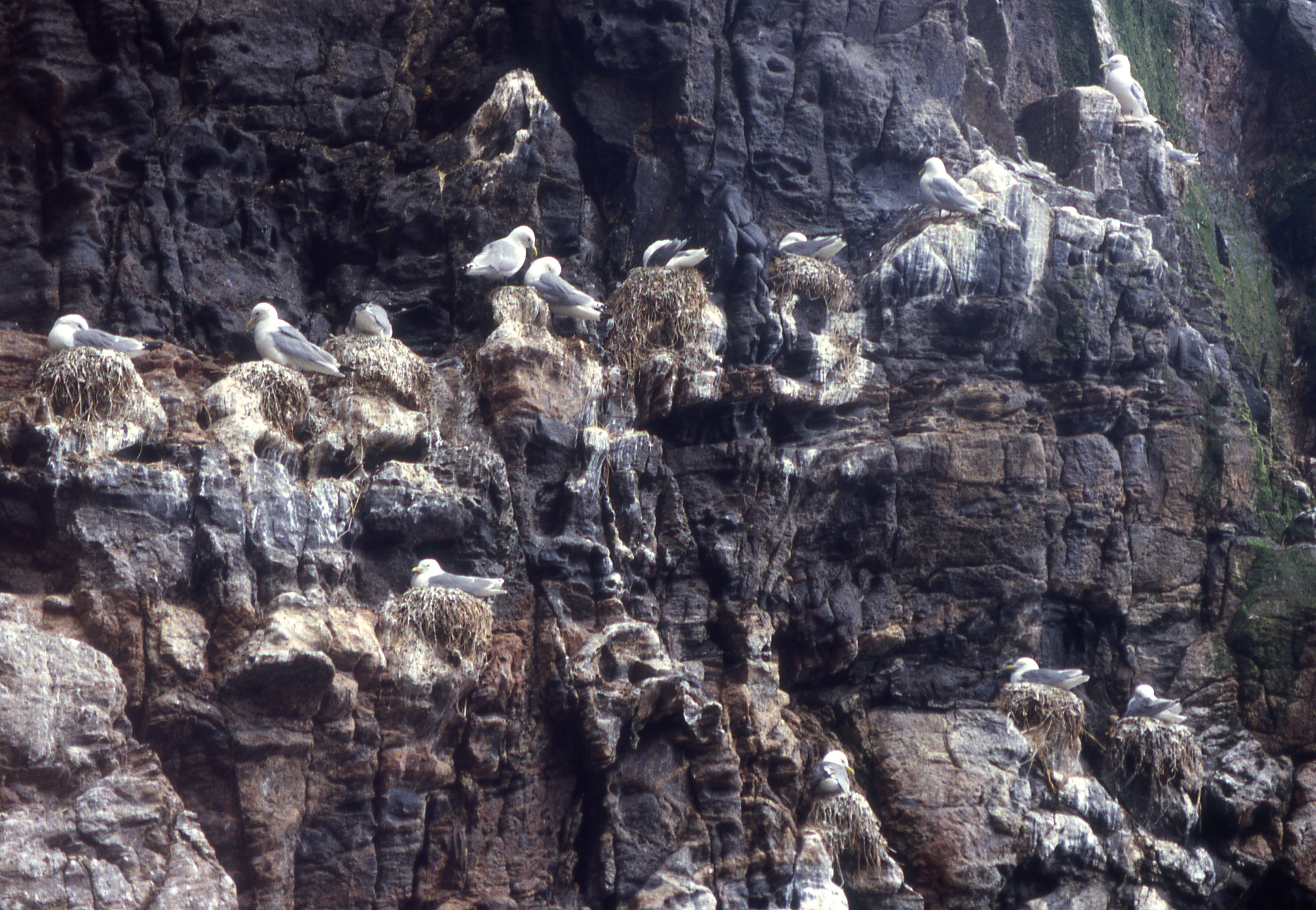 Porzione di una colonia di gabbiano tridattilo (Rissa tridactyla) sull'isola di Runde (Norvegia)